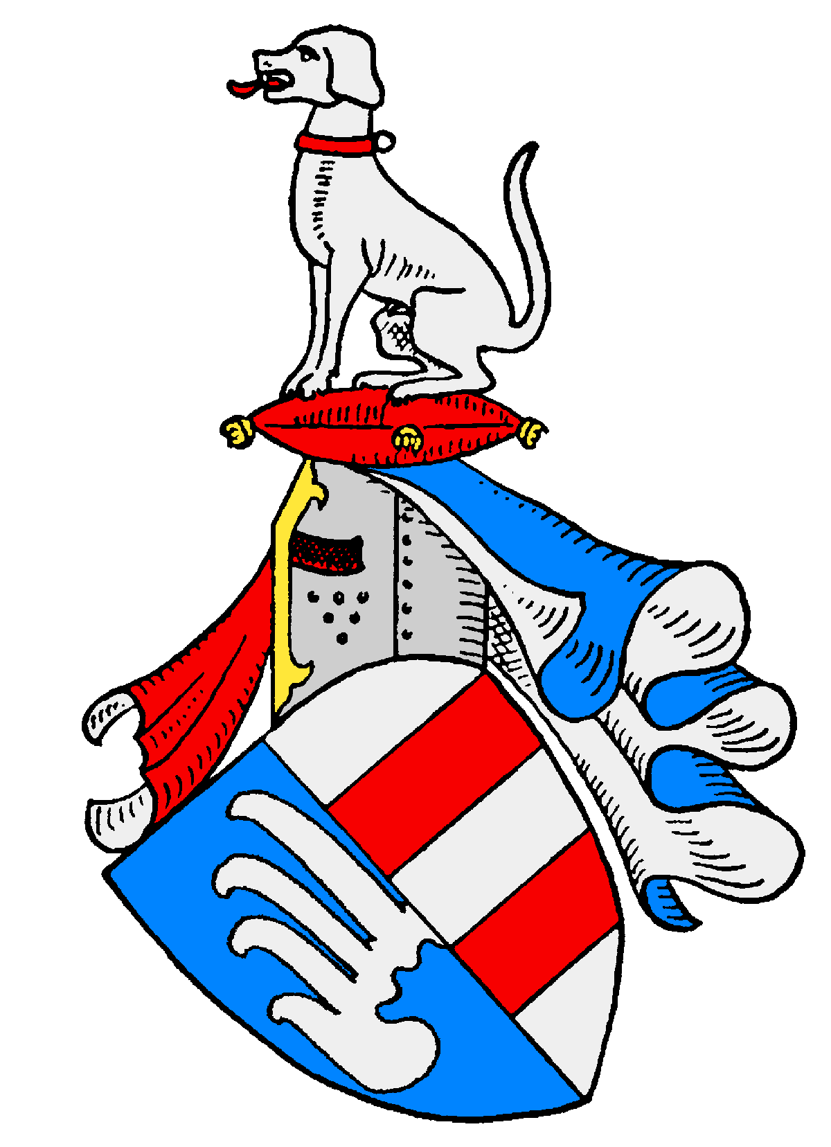 Stammwappen der von Rumohr